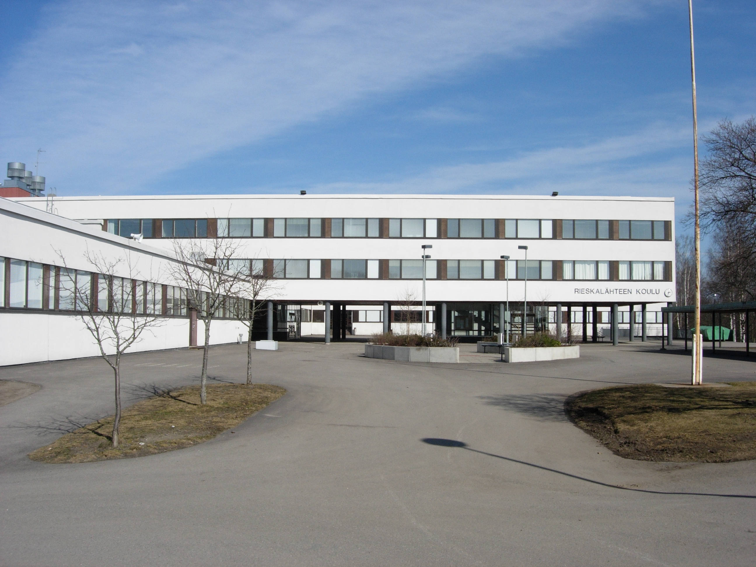 Rieskalähteen koulu, Turku. Entinen Läntinen kansalaiskoulu. Arkkitehti Olli Vahtera 1962, valmistunut 1963, muutoksia mm. 1973.